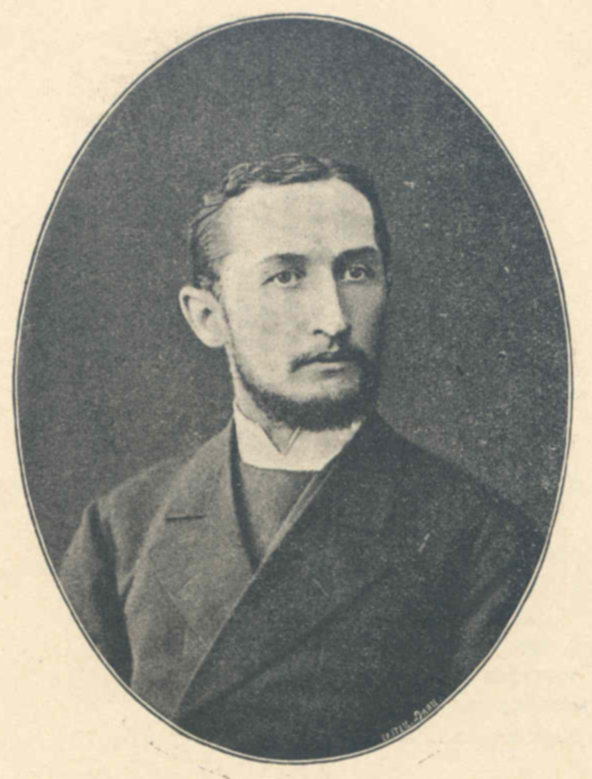 Мельгунов, Николай Александрович (1804-1867) — русский писатель, муз. крити, теоретик музыки